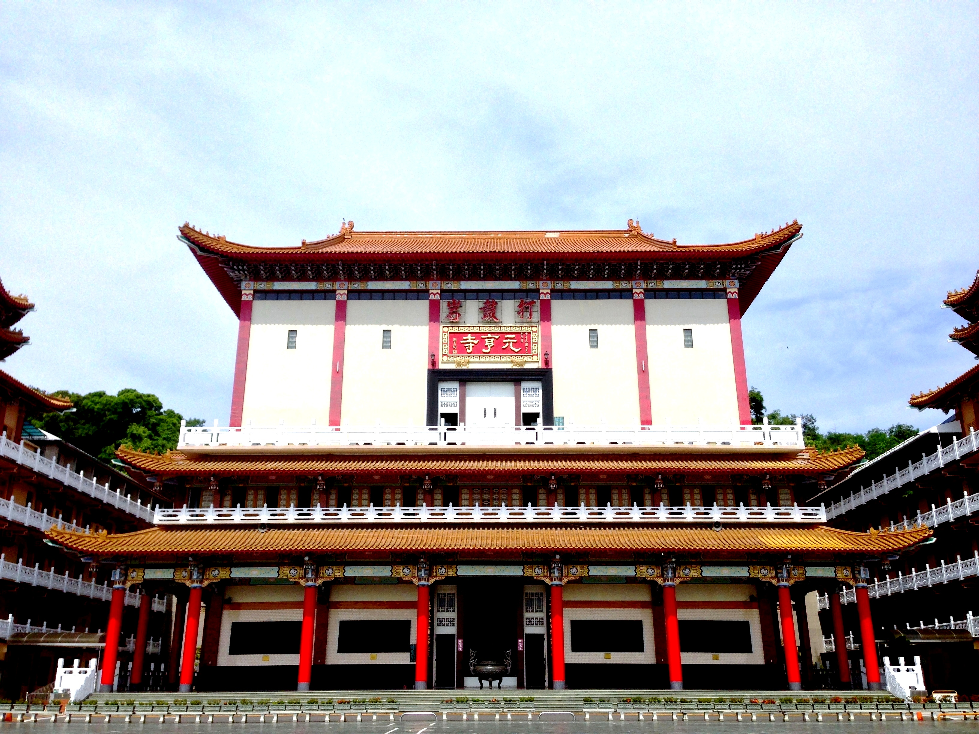 高雄元亨寺